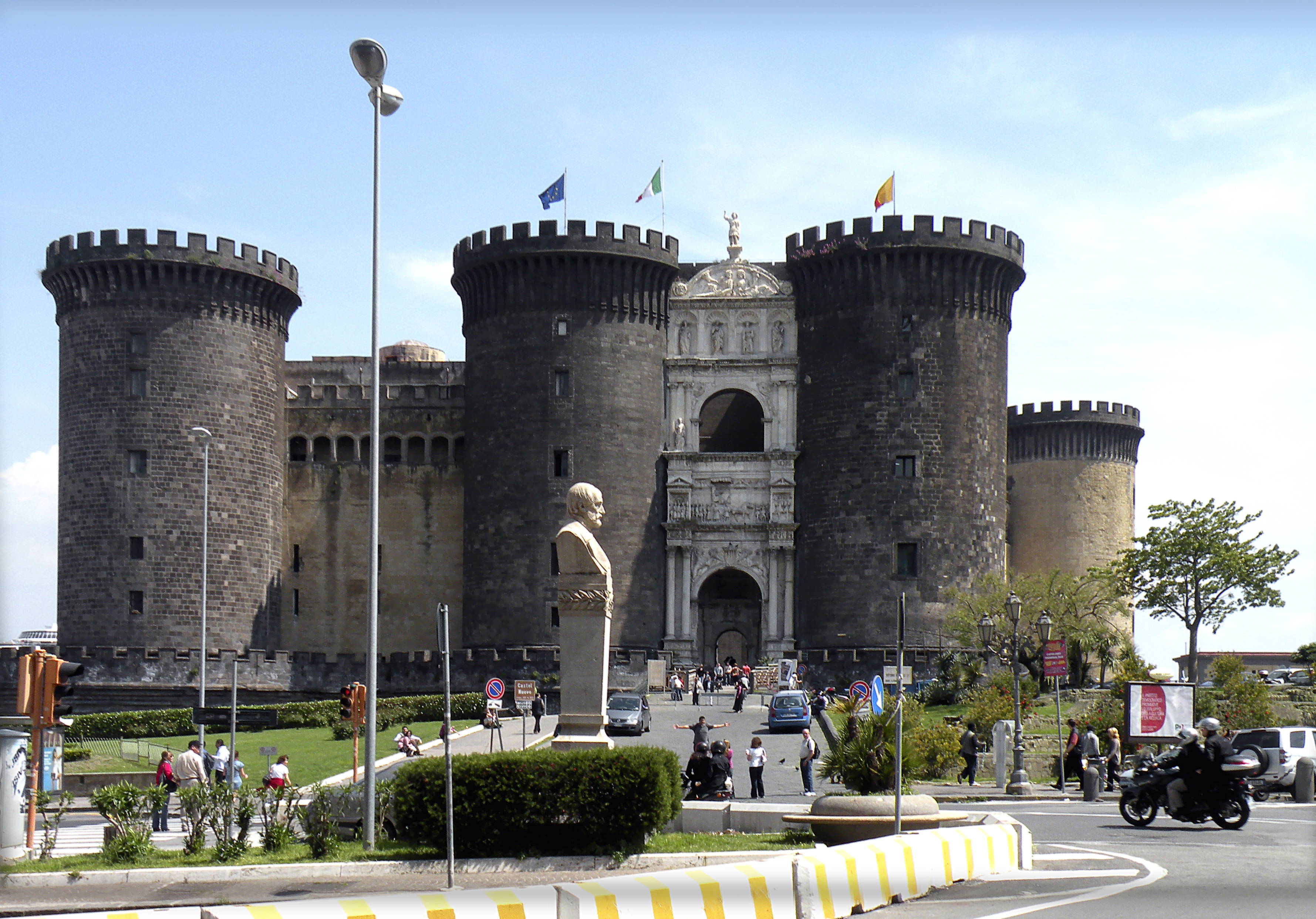 Napoli. Castello Nuovo.